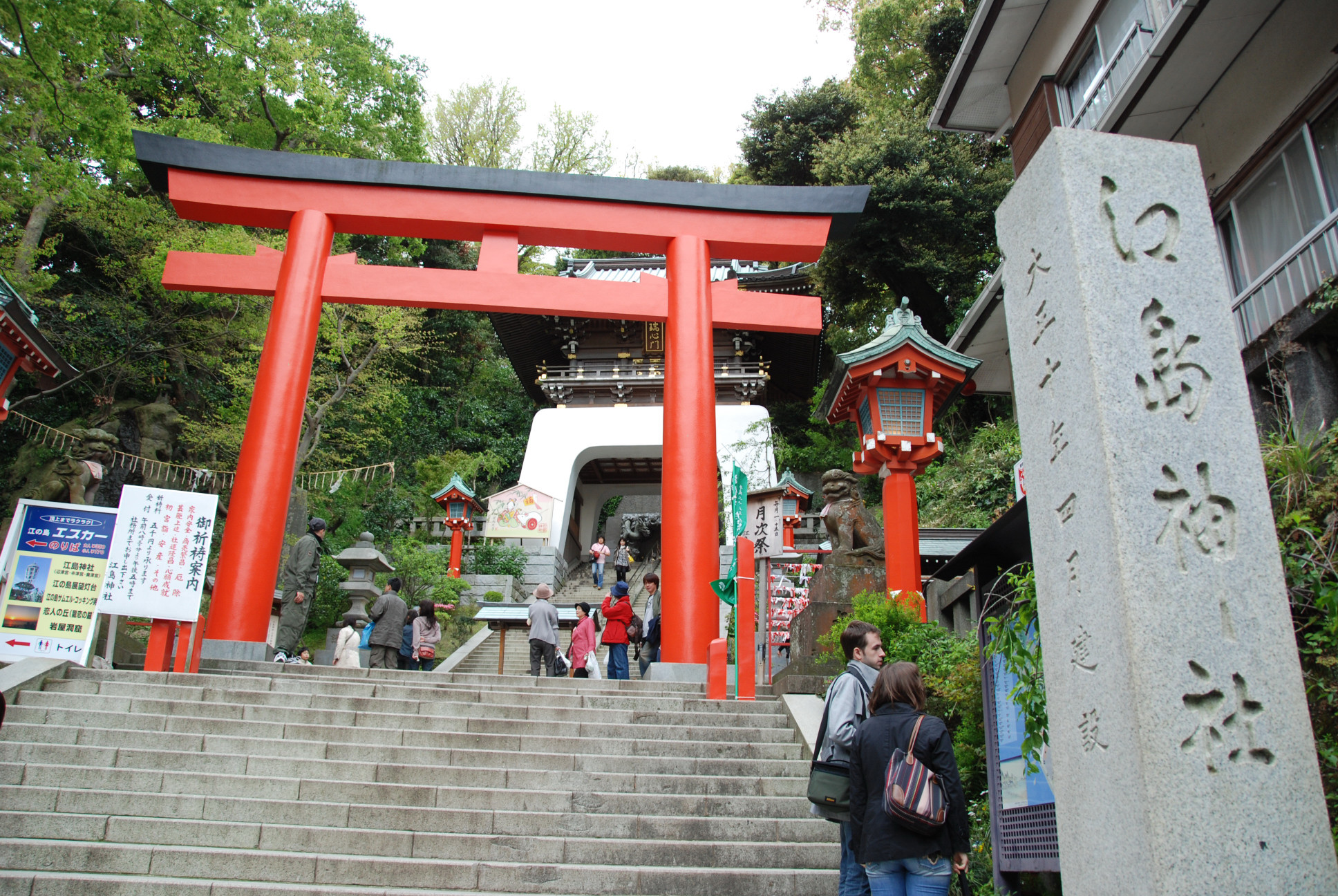 1 Chome Enoshima, Fujisawa-shi, Kanagawa-ken 251-0036, Japan